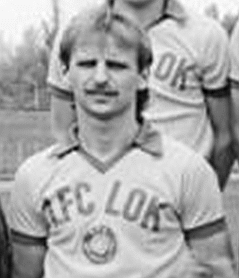 Title: Mannschaftsfoto 1. FC Lok Leipzig Factual corrections and alternative descriptions are encouraged separately from the original description. Additionally errors can be reported at this page to inform the Bundesarchiv. Original historic description: ADN-ZB-Kluge-23.8.83-zin-Leipzig: Die Mannschaft des 1. FC Lok Leipzig für die Fußball-Oberligasaison 1983-84. Vorn v.l.n.r.: Andreas Bornschein, Dieter Kühn, Wolfgang Altmann, Lutz Moldt und Frank Baum. Mitte v.l.n.r.: torhüter Siegfried Stötzner, Rainer Wallek, Hans-Jürgen Kinne, Uwe Zötzsche, Peter Schöne, Mannschaftskapitän Thomas Dennstedt und Torhüter Rene Müller. Hinten v.l.n.r.: Uwe Bredow, Ronald Kreer, Carsten Rost, Andreas Treske, Raymond Haarseim und Hans Richter. Die Elf aus der Messestadt trifft in der ersten Runde des Fußball-UEFA-Pokals am 14.9. (in Bordeaux) und 28.9 (In Leipzig) auf die europäische Spitzenmannschaft von Girondins Bordeaux.